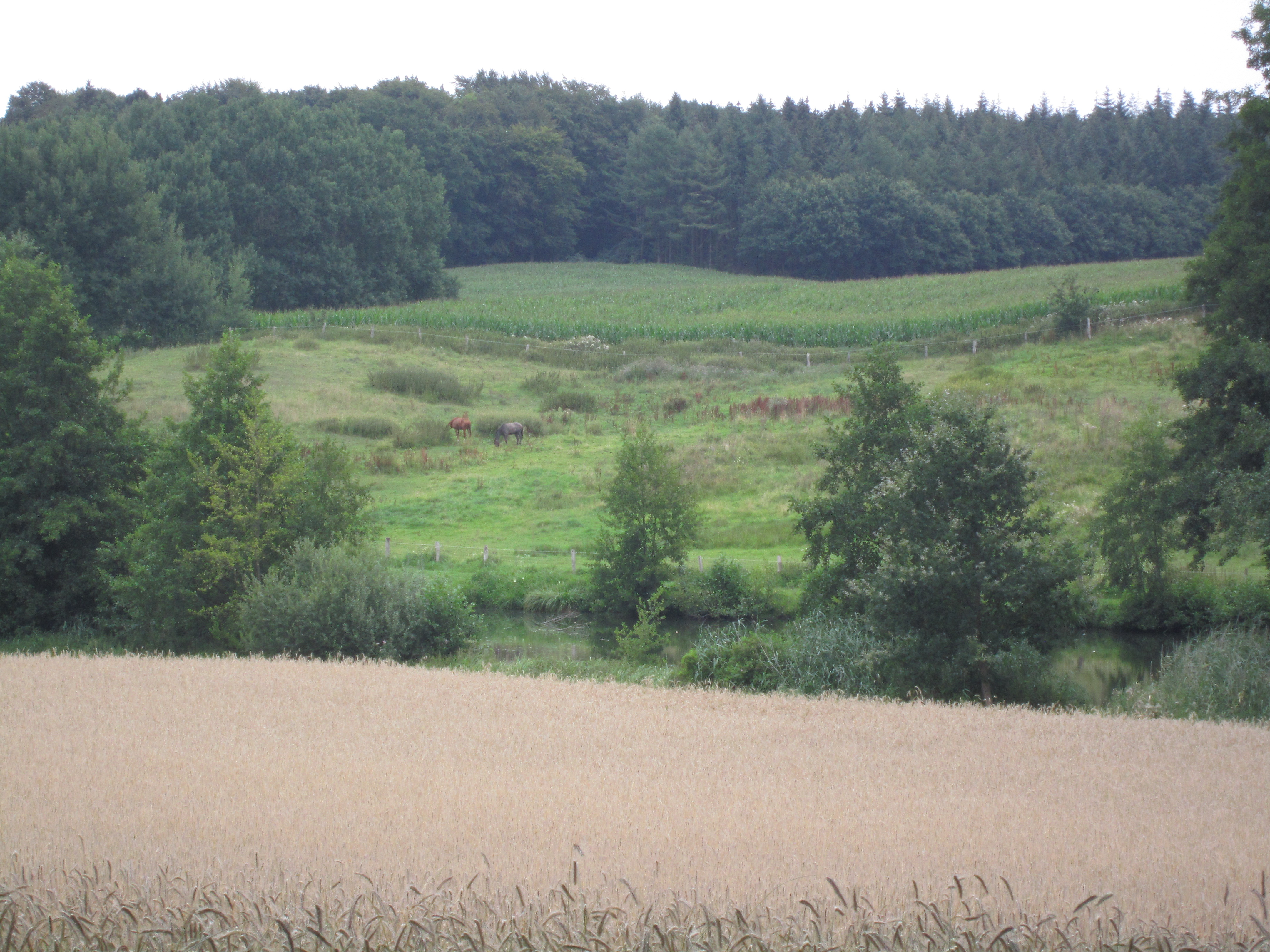 Dammer Berge in Wahlde (Gemeinde Neuenkirchen-Vörden im niedersächsischen Landkreis Vechta)